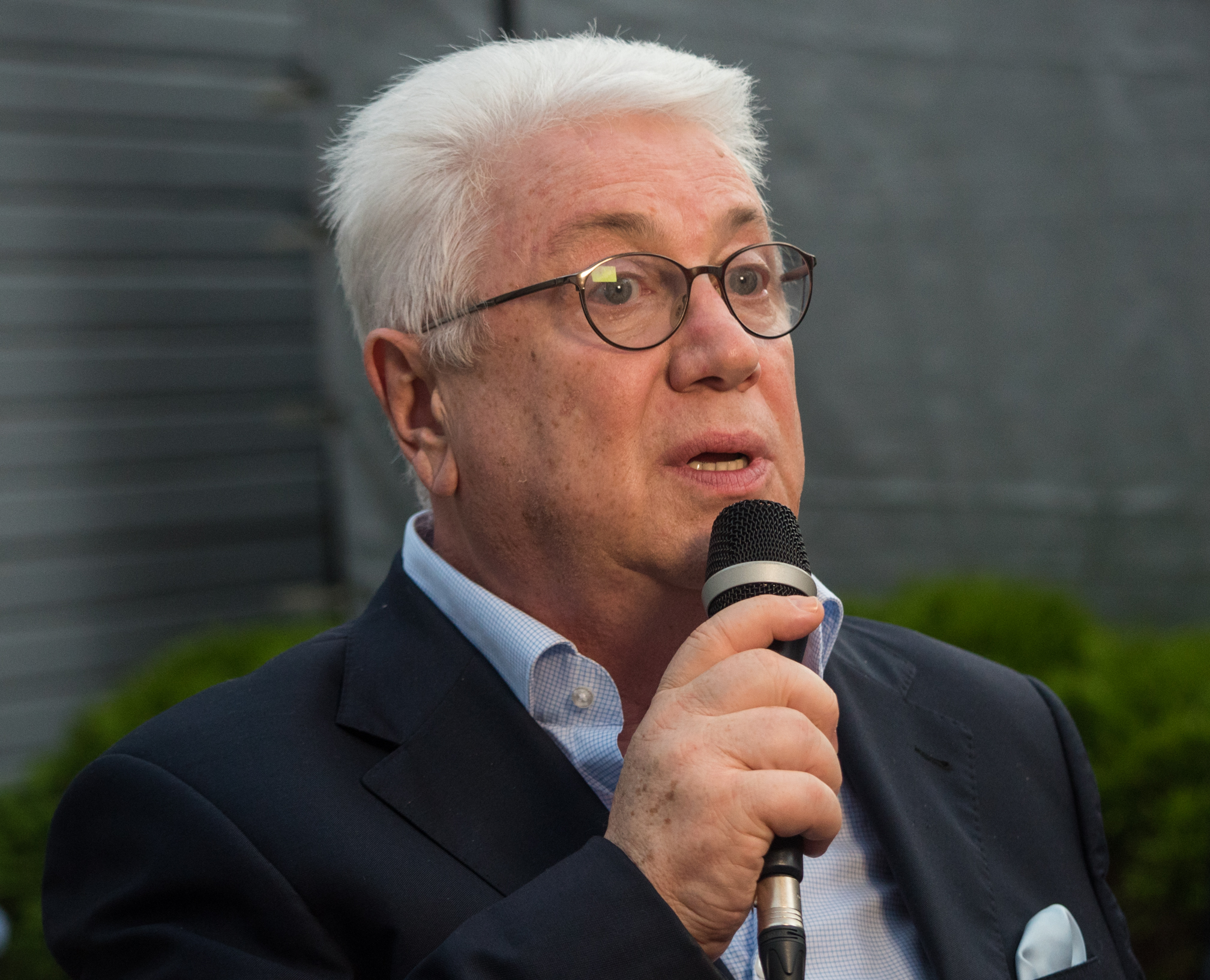 Владимир Винокур на фестивале «Лайма. Рандеву. Юрмала 2017»